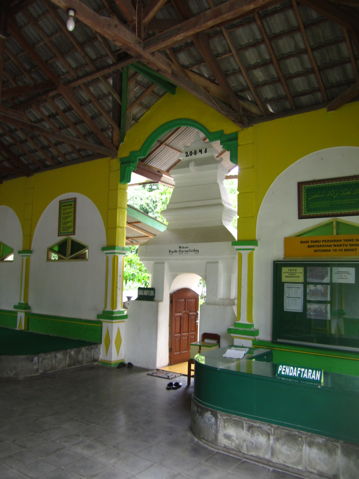 Gerbang kedua memasuki kompleks pemakaman Ki Ageng Gribig